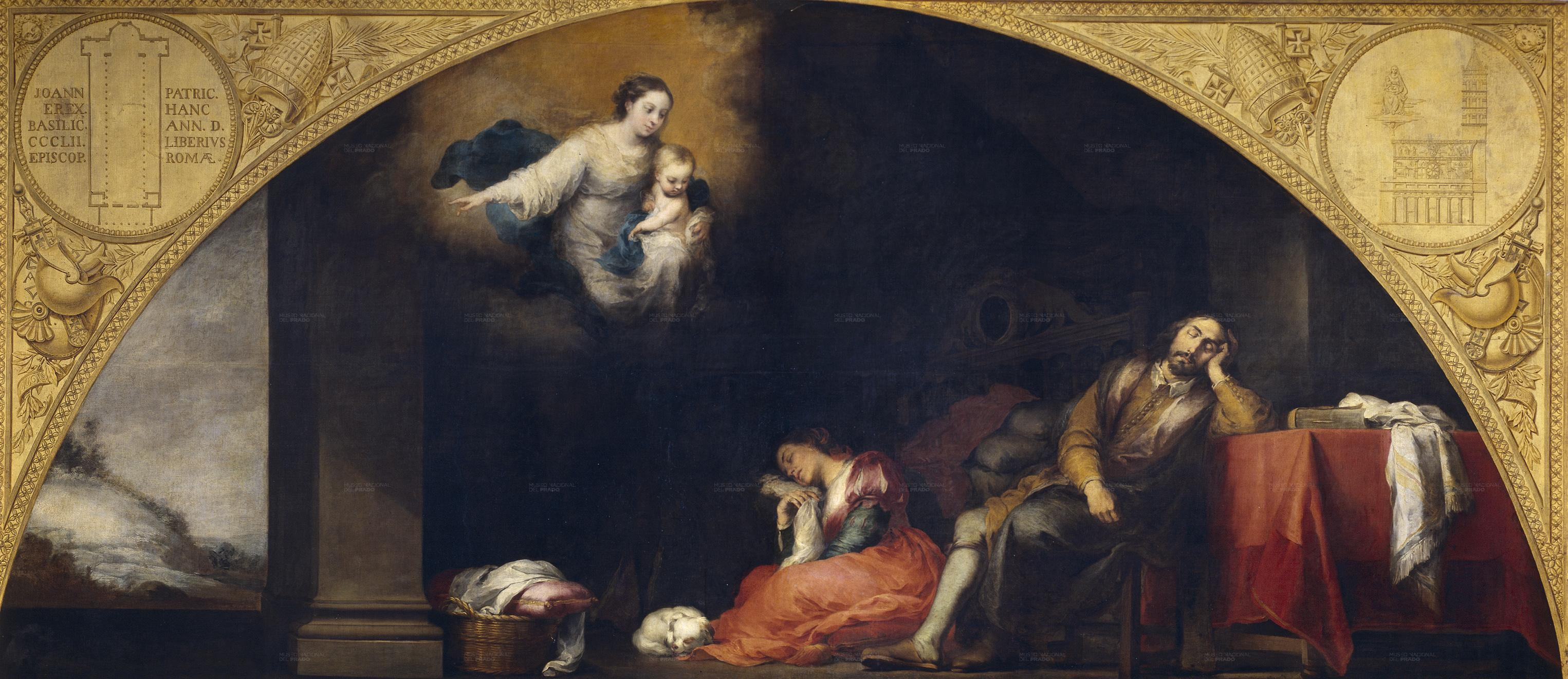 La obra, que está inspirada en la fundación de la Basilica di Santa Maria Maggiore de Roma, representa el momento en que el patricio Juan tuvo un sueño en el que se le apareció la Virgen María y el Niño Jesús.